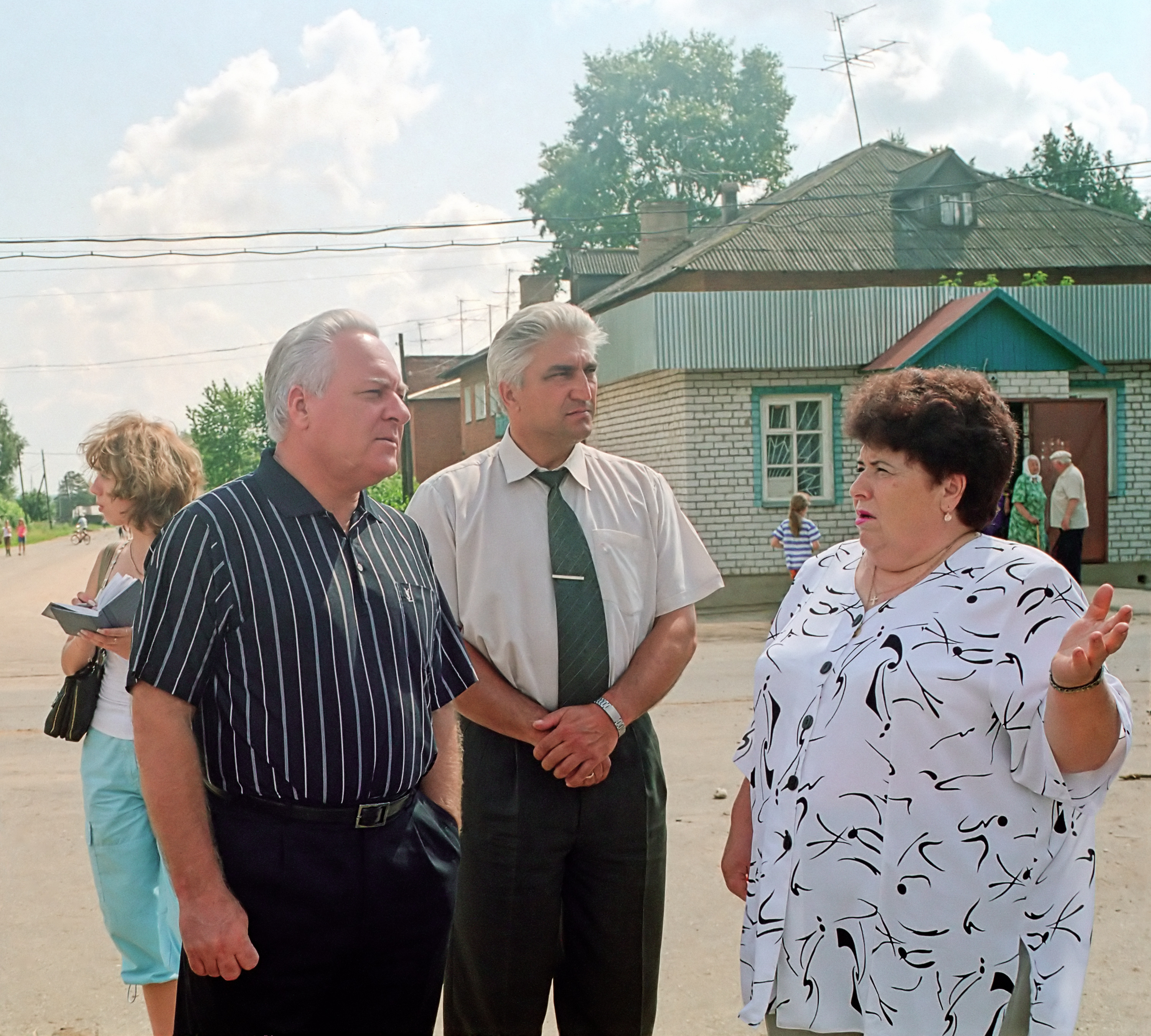 Анатолий Иванович Лисицын во время поездки по Переславскому району. Слева направо: Анатолий Иванович Лисицын (губернатор Ярославской области), Александр Анатольевич Рычков (директор ПМК-11), Валентина Анатольевна Гусарова (в девичестве Баранова, глава администрации посёлка Кубринск). Посёлок Кубринск, Переславский район, в начале Комсомольской улицы перед Домом культуры.